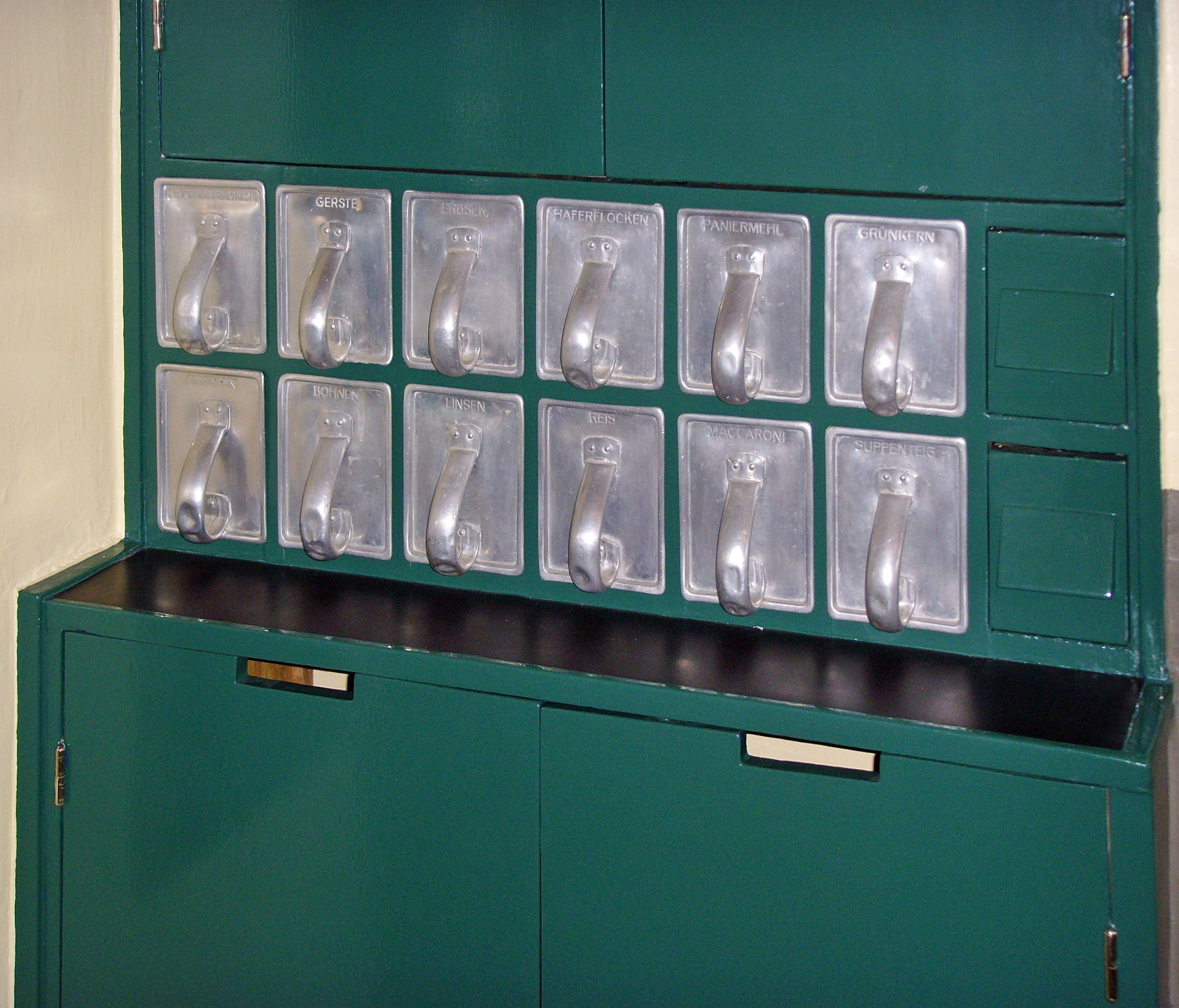 Schütten (Originale am ursprünglichen Platz) einer Frankfurter Küche. Ernst-May-Haus, Im Burgfeld 136, Frankfurt am Main-Römerstadt